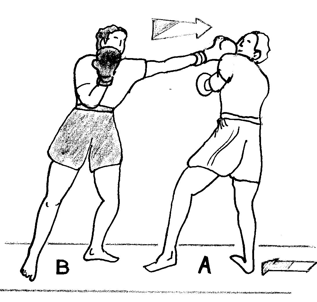 jab2.jpg